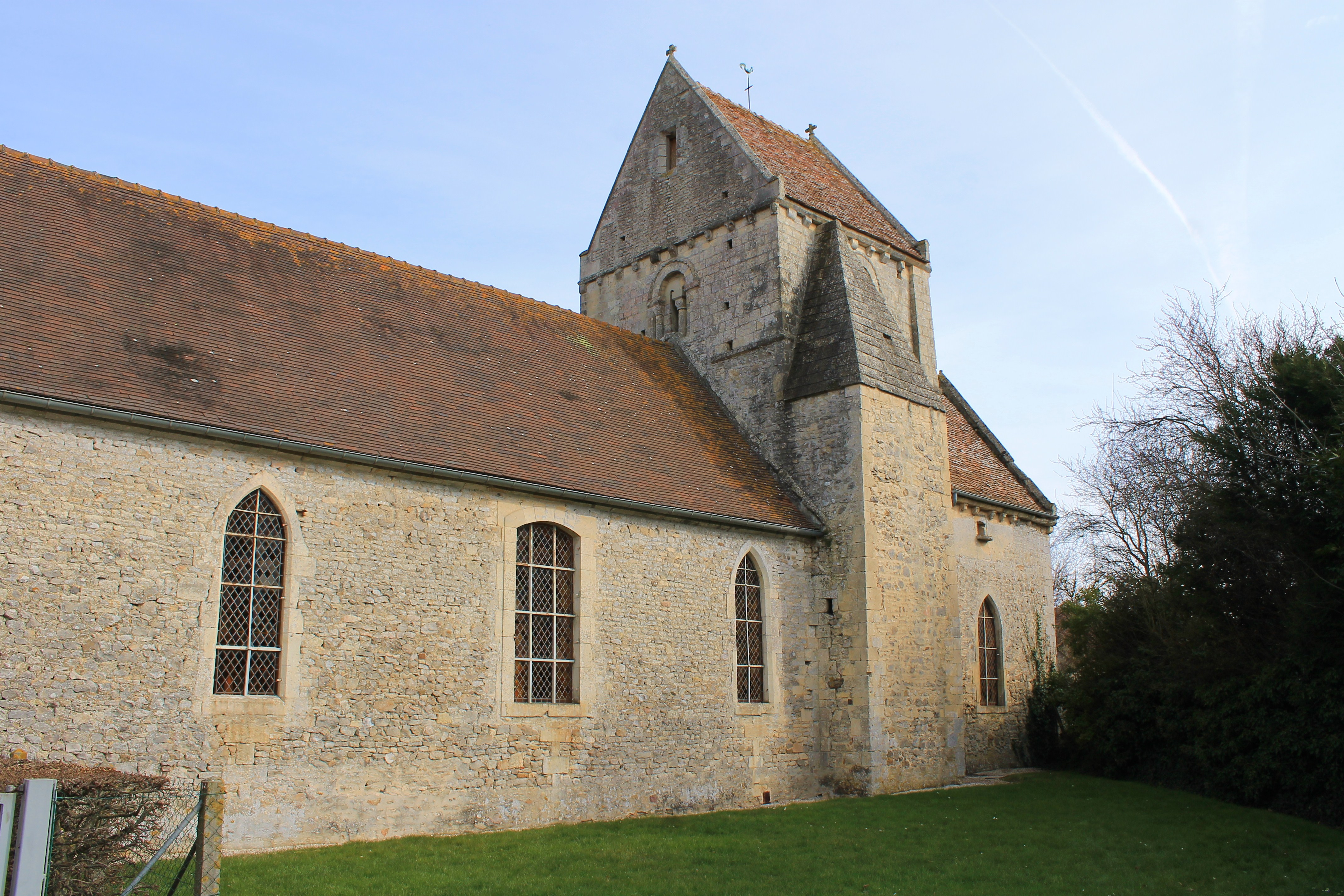 Église Saint-Lo du XII et XV ème siècle à Bretteville-le-Rabet (Calvados)